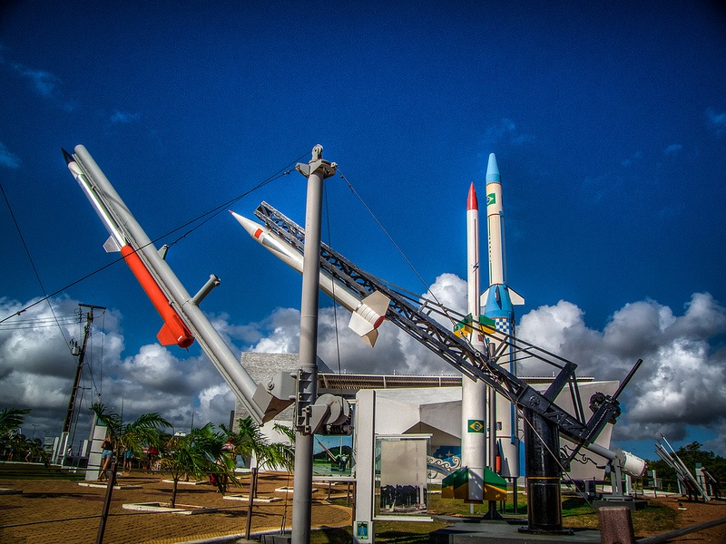 A família de foguetes da série Sonda, no Jardim de foguetes do Centro de Lançamento da Barreira do Inferno. Da frente para o fundo, os foguetes Sonda I, II, III e IV.